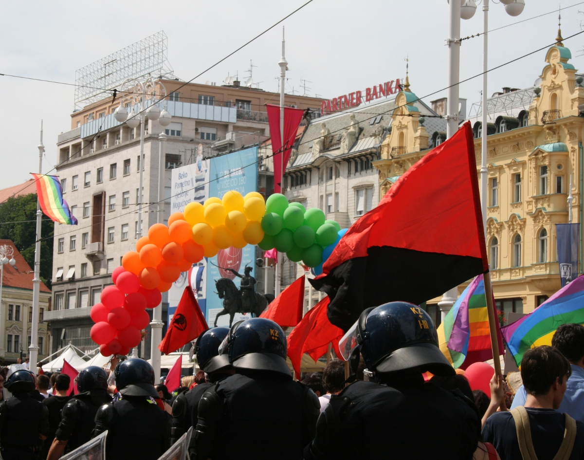 Zagrebački Pride 2011.